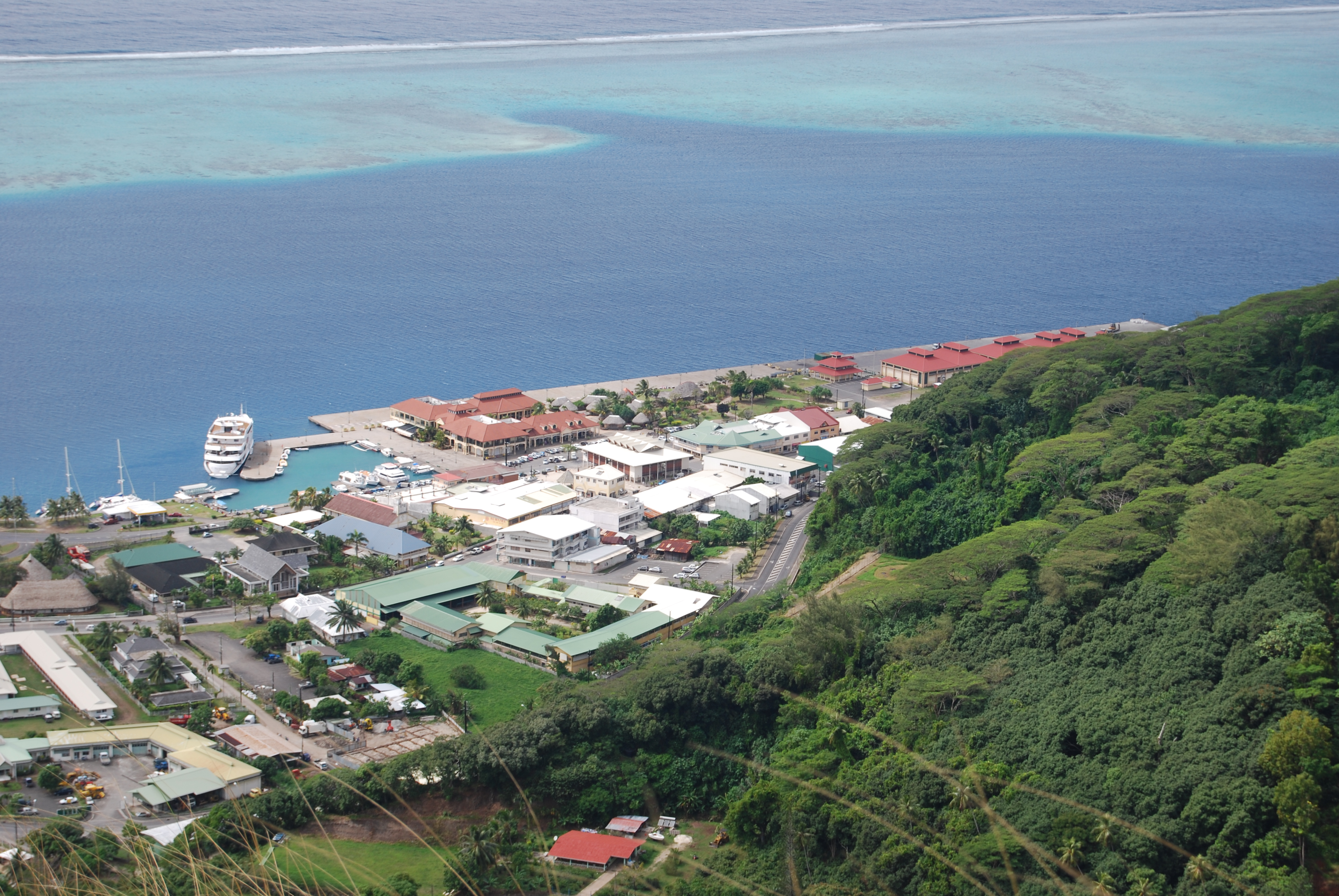 Centre ville de Uturoa.